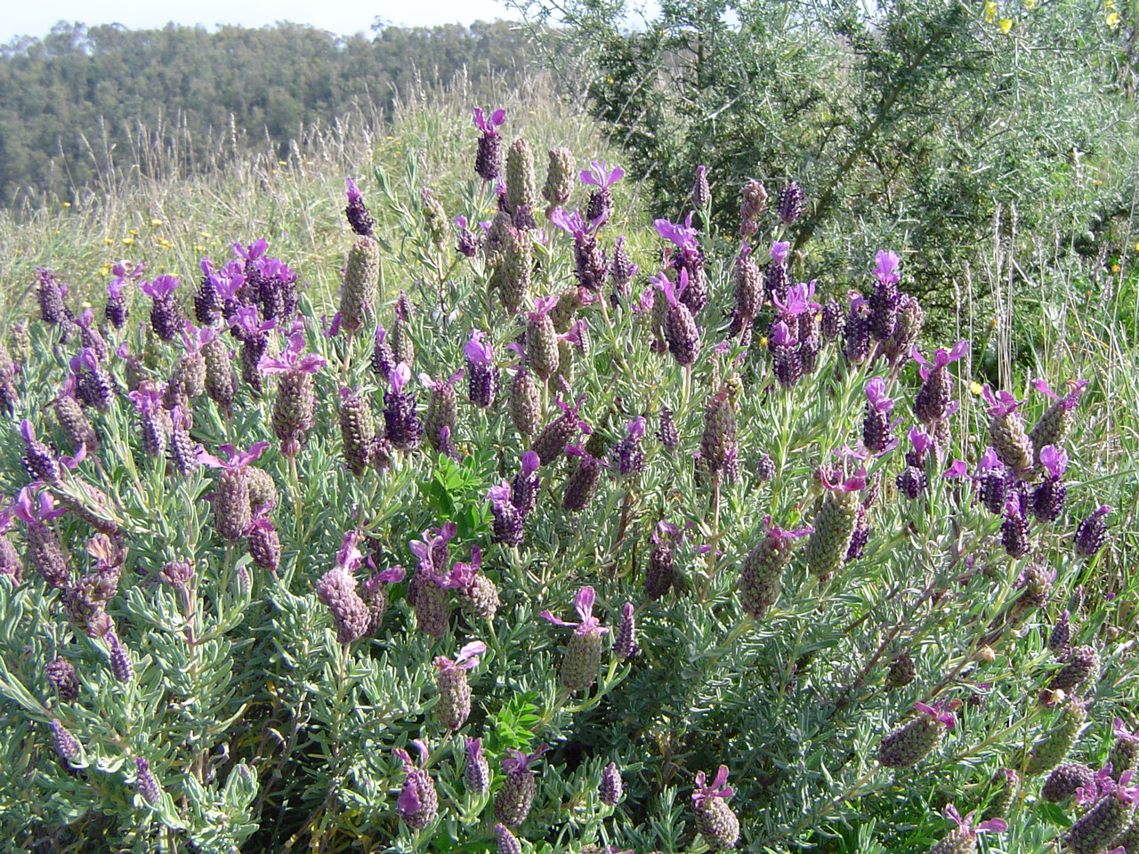 Lavandula stoechas, Ceuta, España